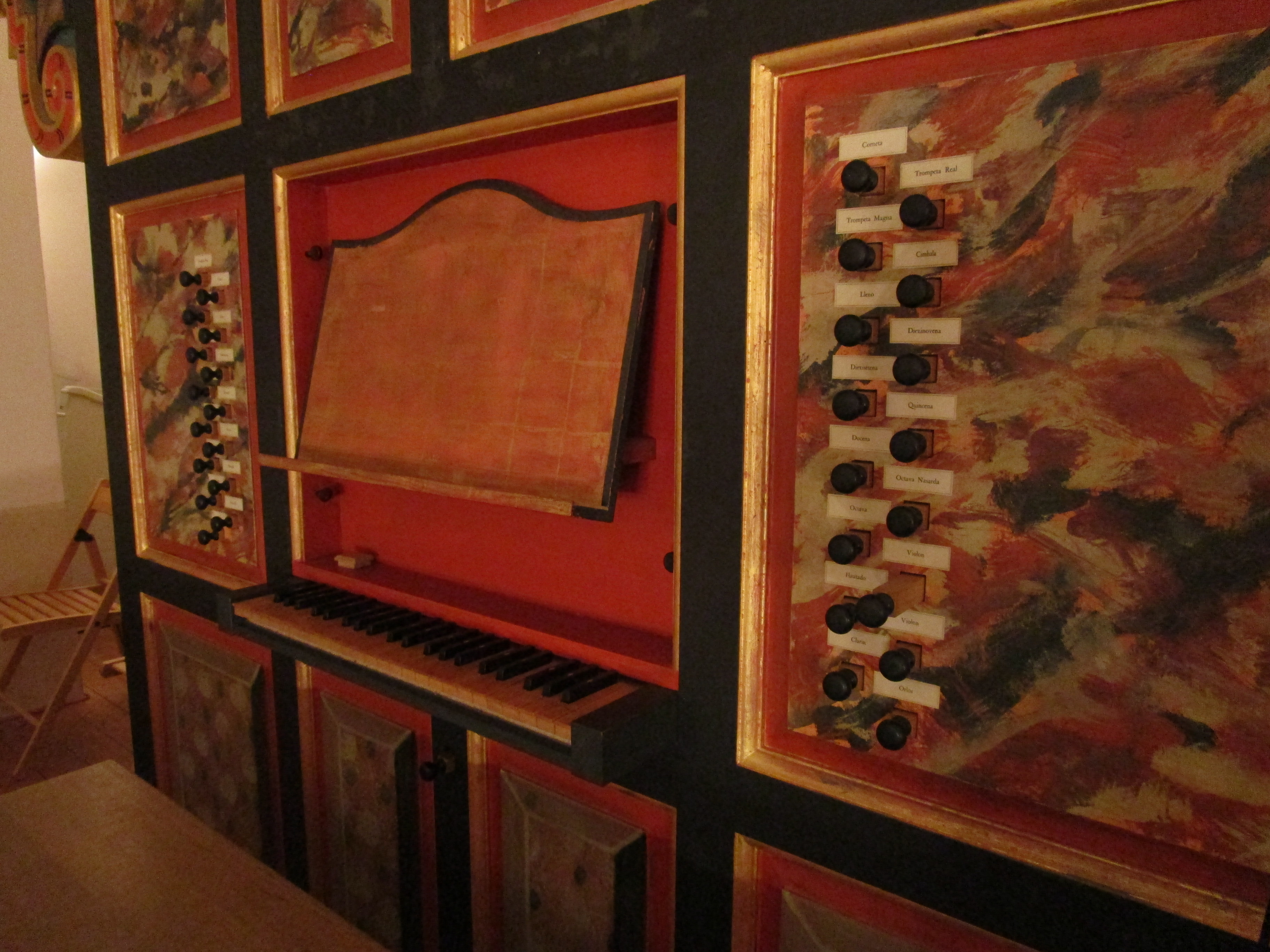 Die Neustädter Hof- und Stadtkirche St. Johannis bekam im Jahr 2019 zusätzlich zur Spanischen Orgel von 2001 (s. auch Spanische Trompete eine neue Orgel (siehe Orgeln der Neustädter Kirche (Hannover)). Beide Orgeln stehen im Eigentum des Landes Niedersachsen, denn sie sind von Bund und Land je zur Hälfte finanzierte Instrumente zur Ausbildung von Studentinnen und Studenten des Studiengangs Kirchenmusik der Hochschule für Musik, Theater und Medien Hannover. Nach dem zwischen Land Niedersachsen und Kirchengemeinde geschlossenen Vertrag steht die 2019 entstandene Thomas-Orgel der Musikhochschule 40 Stunden in der Woche für die Ausbildung der Studierenden zur Verfügung. Die neue Orgel wurde am 26. Oktober 2019 von Orgelprofessor Emmanuel Le Divellec (Musikhochschule Hannover) mit einem reinen Programm von Orgelmusik von Johann Sebastian Bach der Öffentlichkeit vorgestellt.